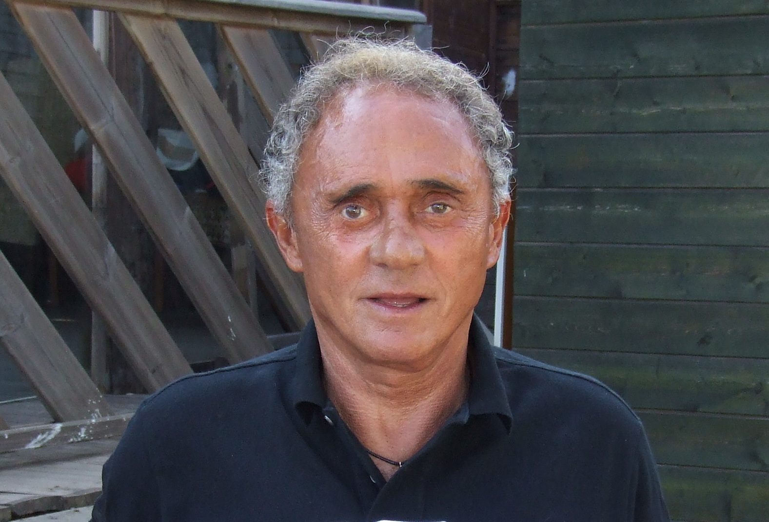 Foto recente di Gianni Di Marzio